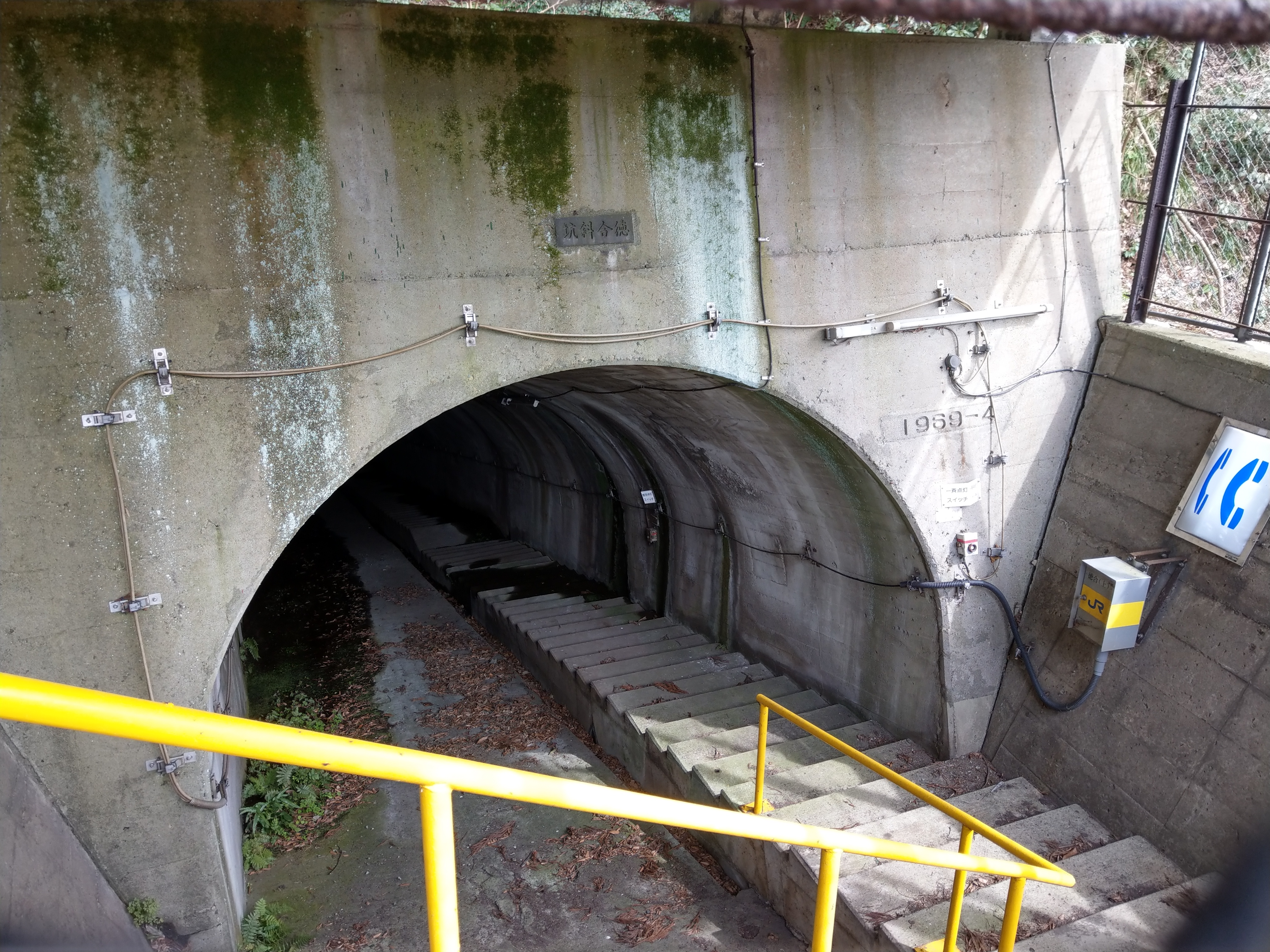 えちごトキめき鉄道日本海ひすいライン頸城トンネル徳合斜坑